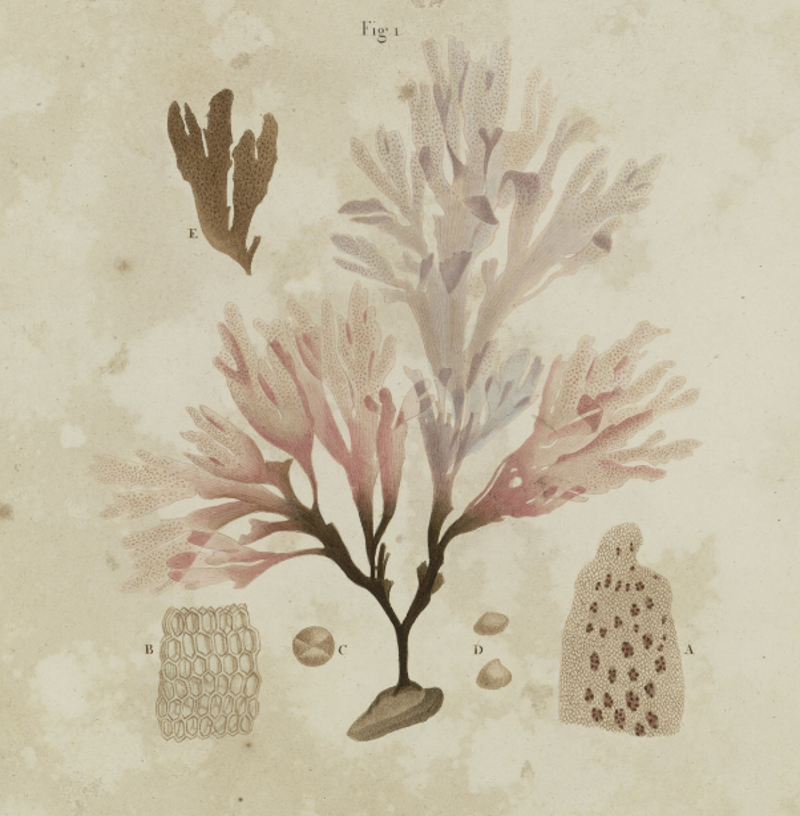 Dessin de l'algue Dawsonie de Durville par Jules Dumont d'Urville, expédition La Coquille, 1829.